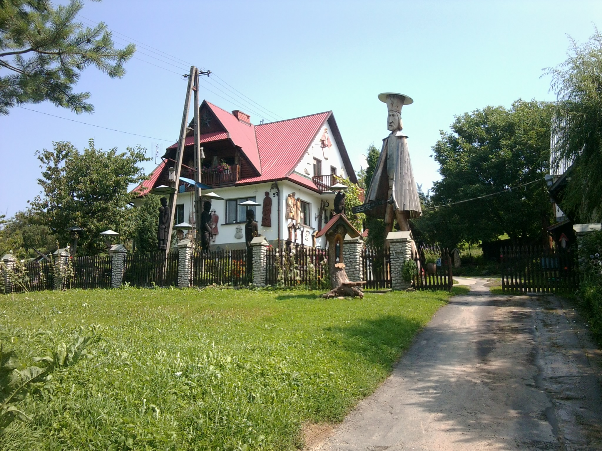 Skansen Rzeźby Monumentalnej w Rogach